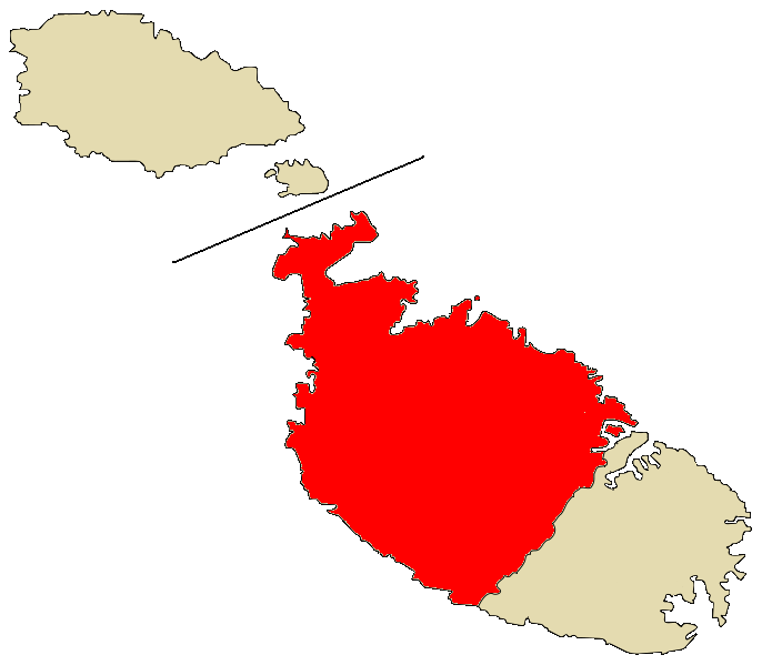 Mapa de la Región de Malta Majjistral